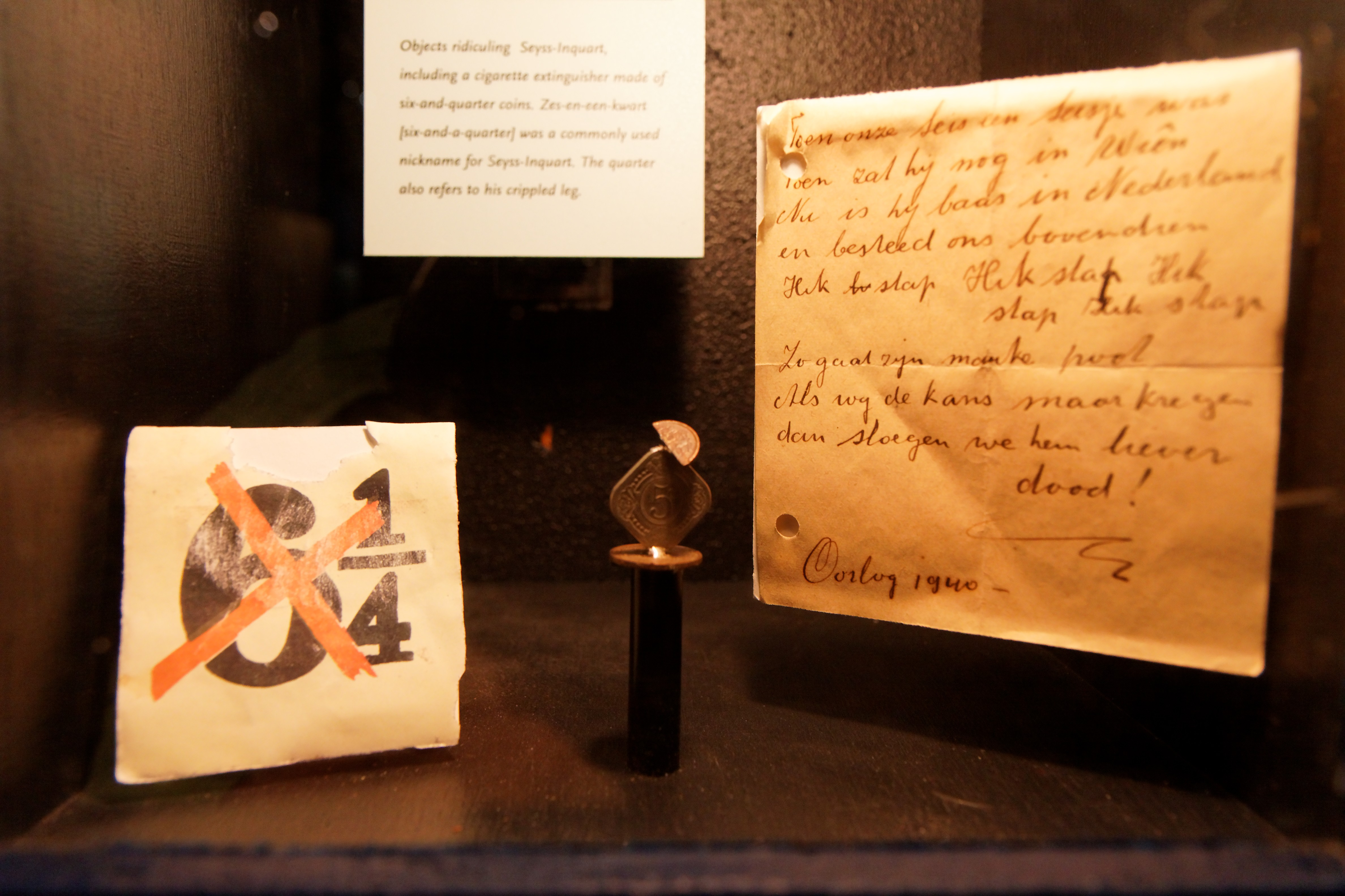 Voorwerpen die Arthur Seyß-Inquart ridiculiseren.